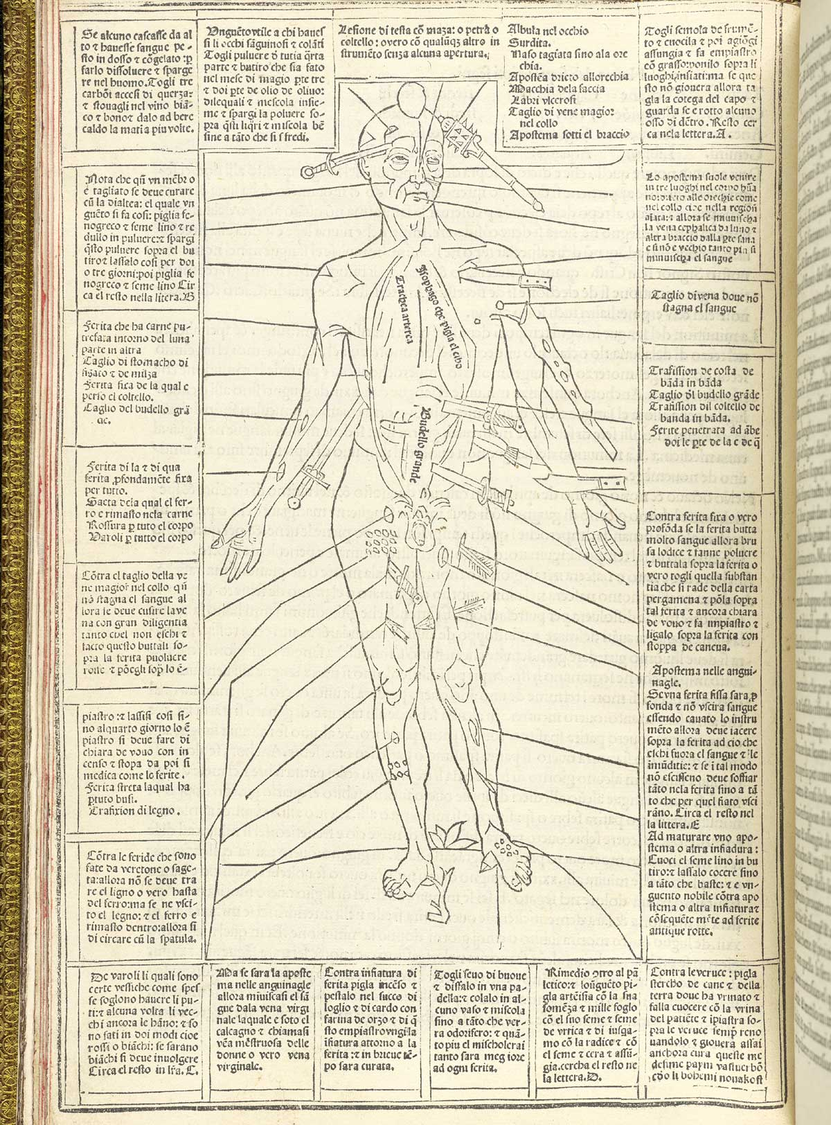 Johannes de Ketham. Fasiculo de medicina. (Veinice, 1495).